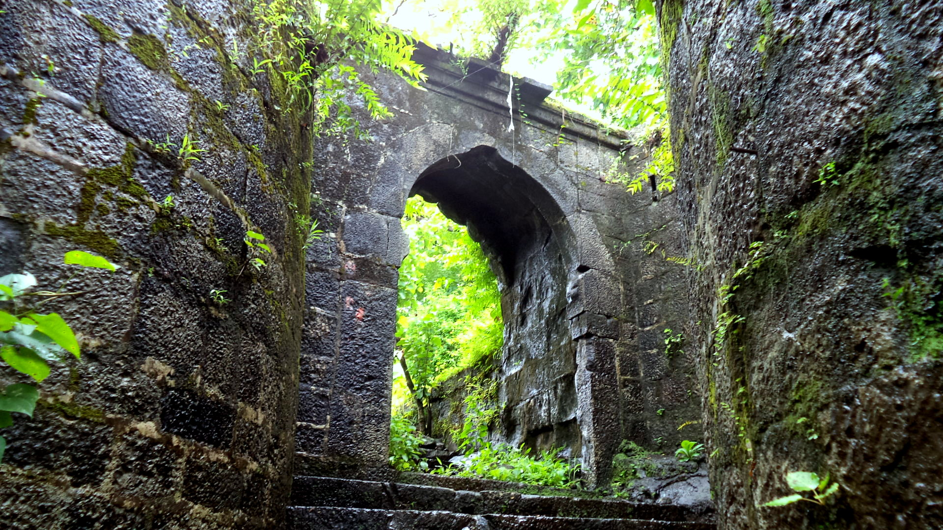 Gate in Birwadi Fort